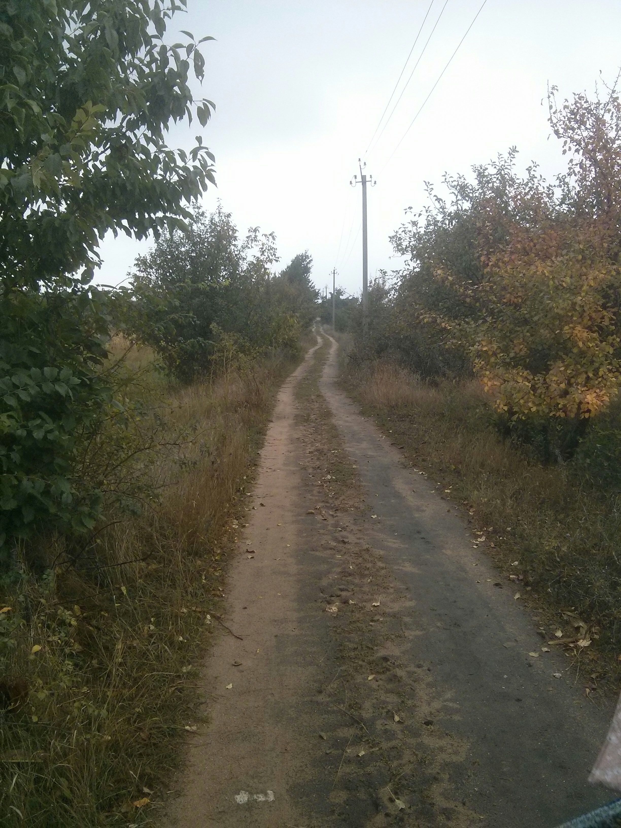 Фото зроблене у вересні 2017 року.